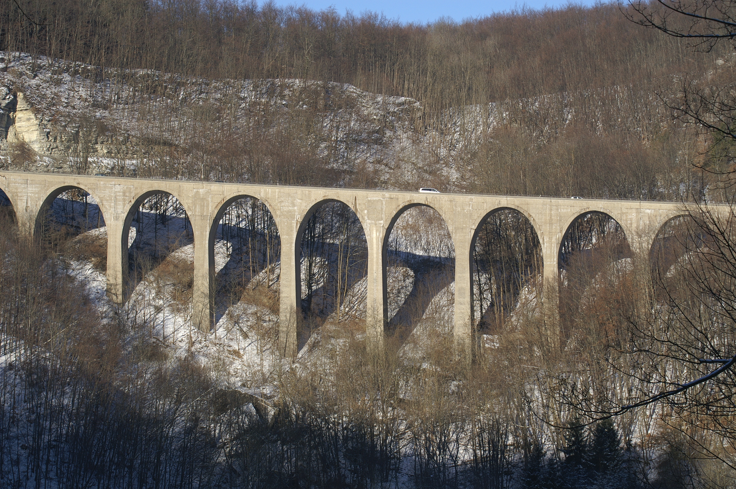 Die Drachenlochbrücke an der Bundesautobahn A8 am Drackensteiner Hang wird nur in Richtung Stuttgart befahren.